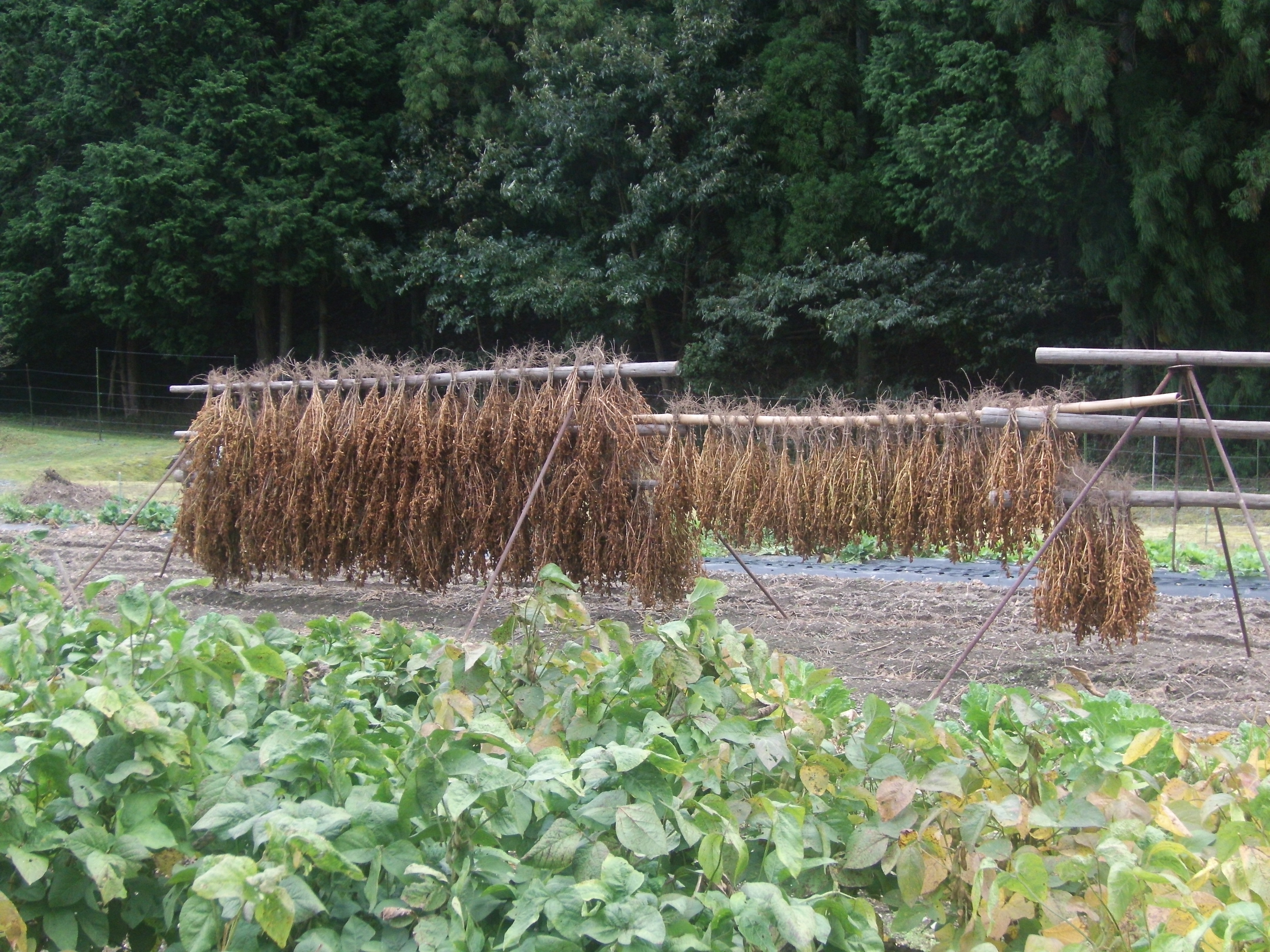 収獲し天日干しされる丹波黒豆 南丹市との境界となる京丹波町の丹波高原山麓を切り拓いた畑にて（背後は京都丹波高原国定公園の森林）